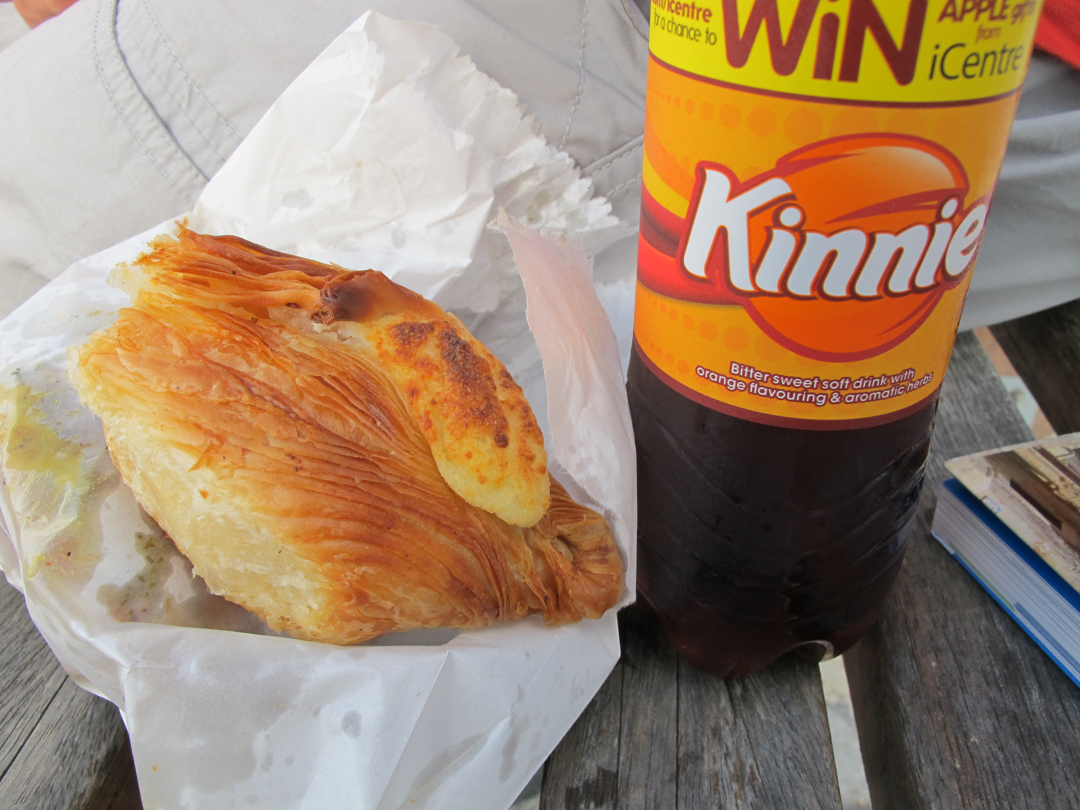 Cheese pastizzi and Kinnie Nov 2014